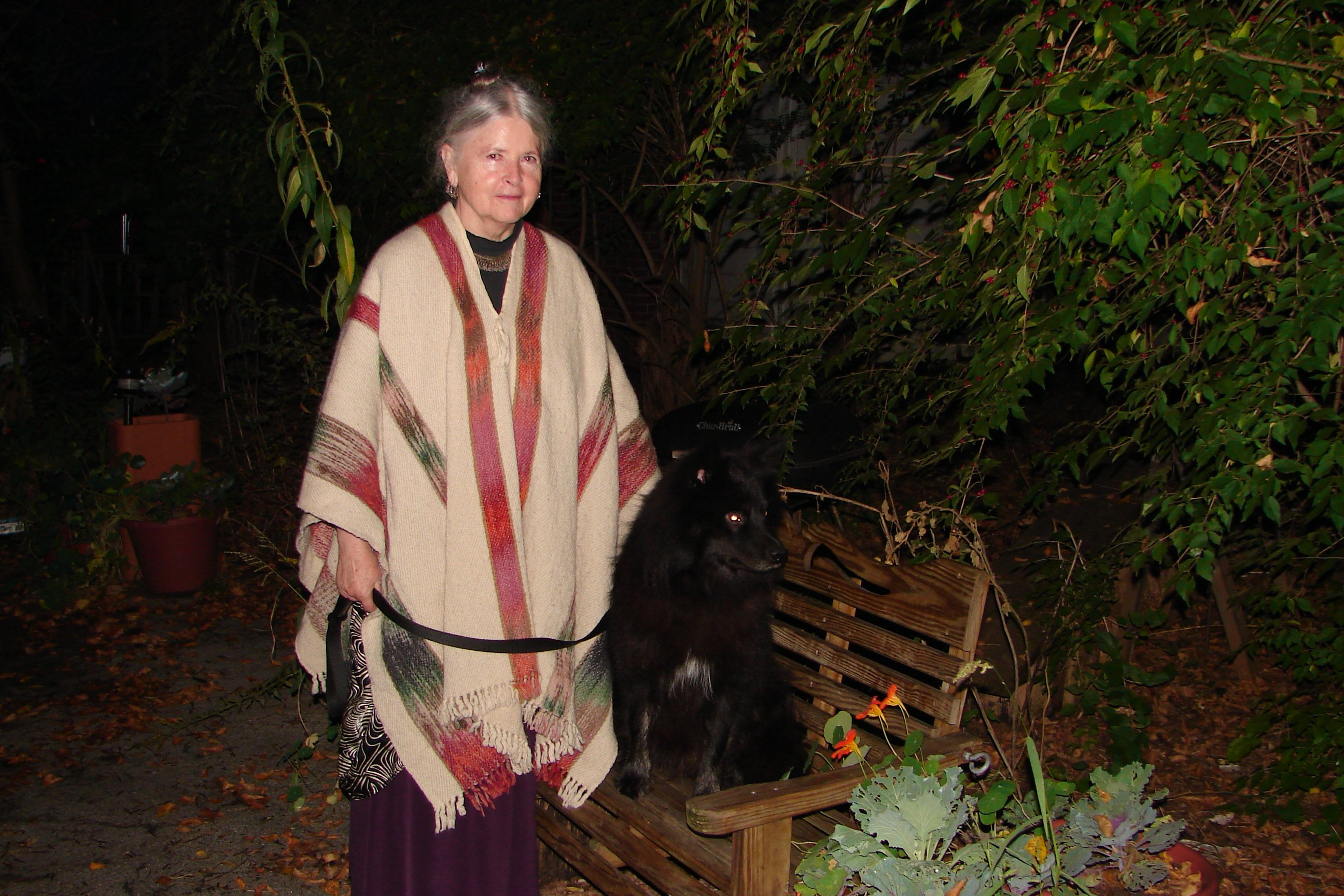 Myrdene Anderson, West Lafayette, Indiana, USA